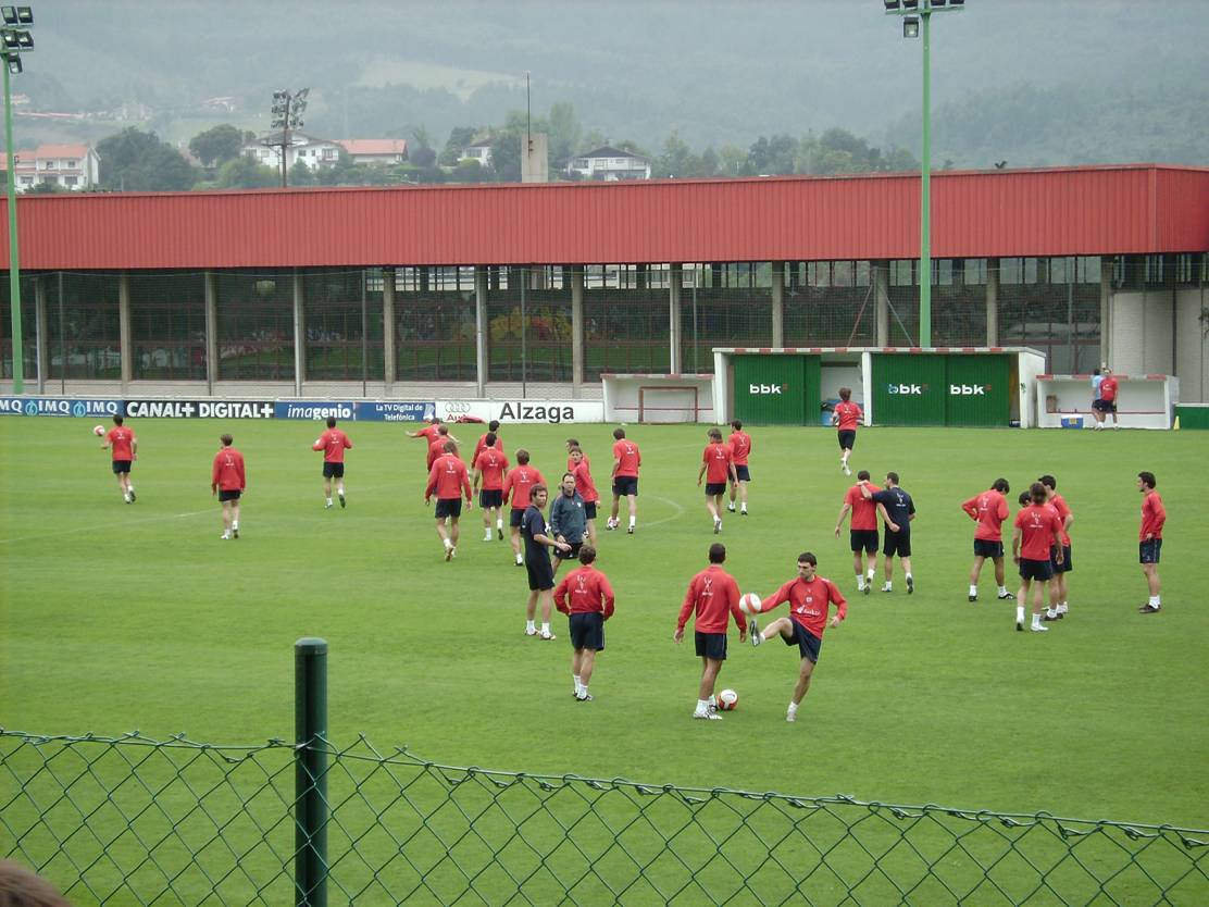 La primera plantilla del Athletic entrenándose en Lezama.Presidente : Don Julito